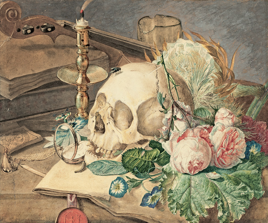 Vanitasstilleben mit Blumenbouquet, Totenschädel, Taschenuhr und erloschener Kerze. Aquarell über Bleistift, auf Velin.